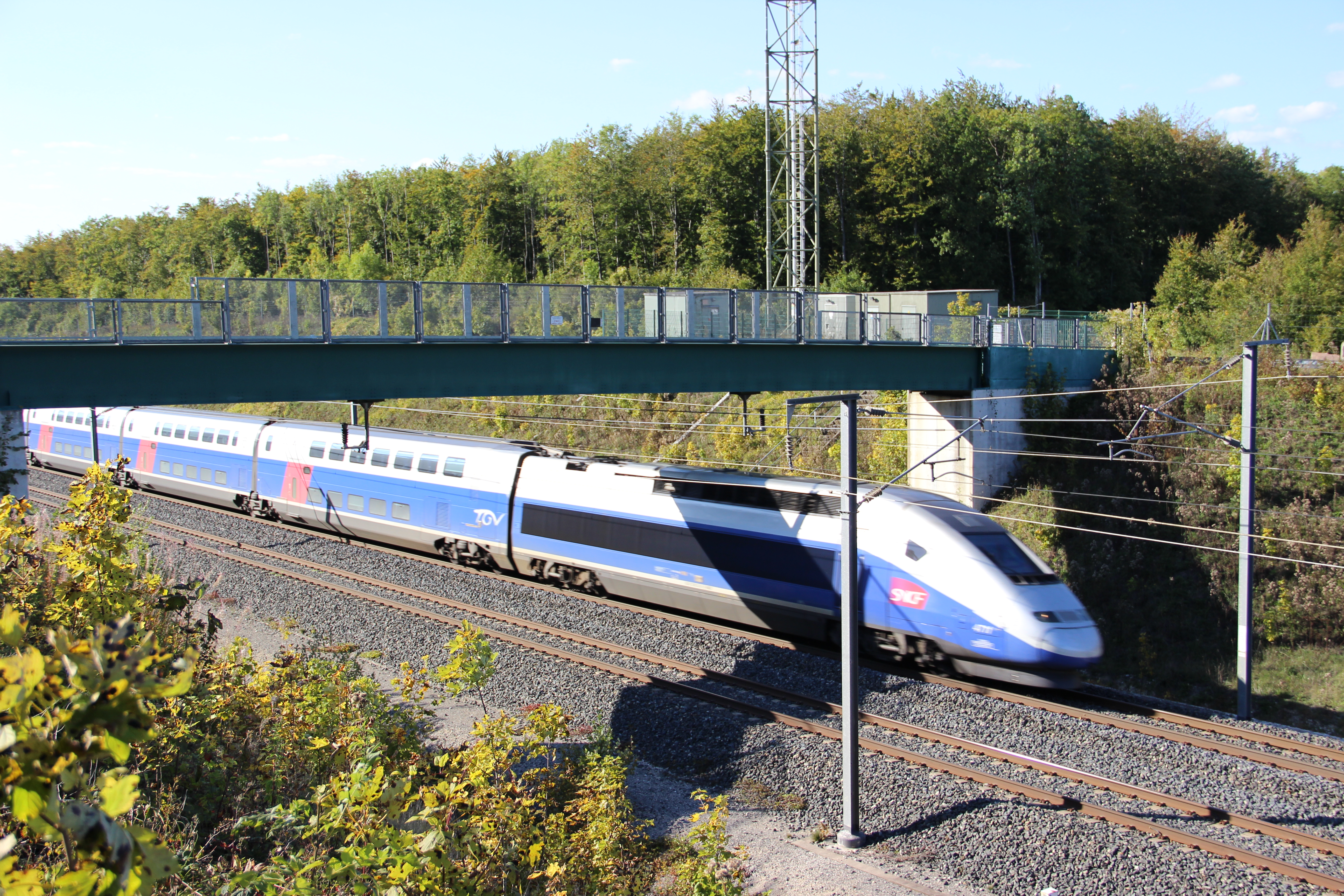 Une rame passe sous la passerelle de Benoite-Vaux (Meuse)